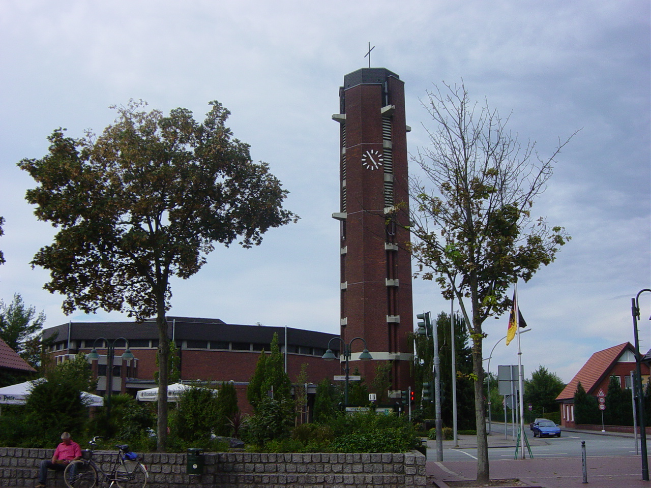 Kirche Sankt Johannes in Beelen